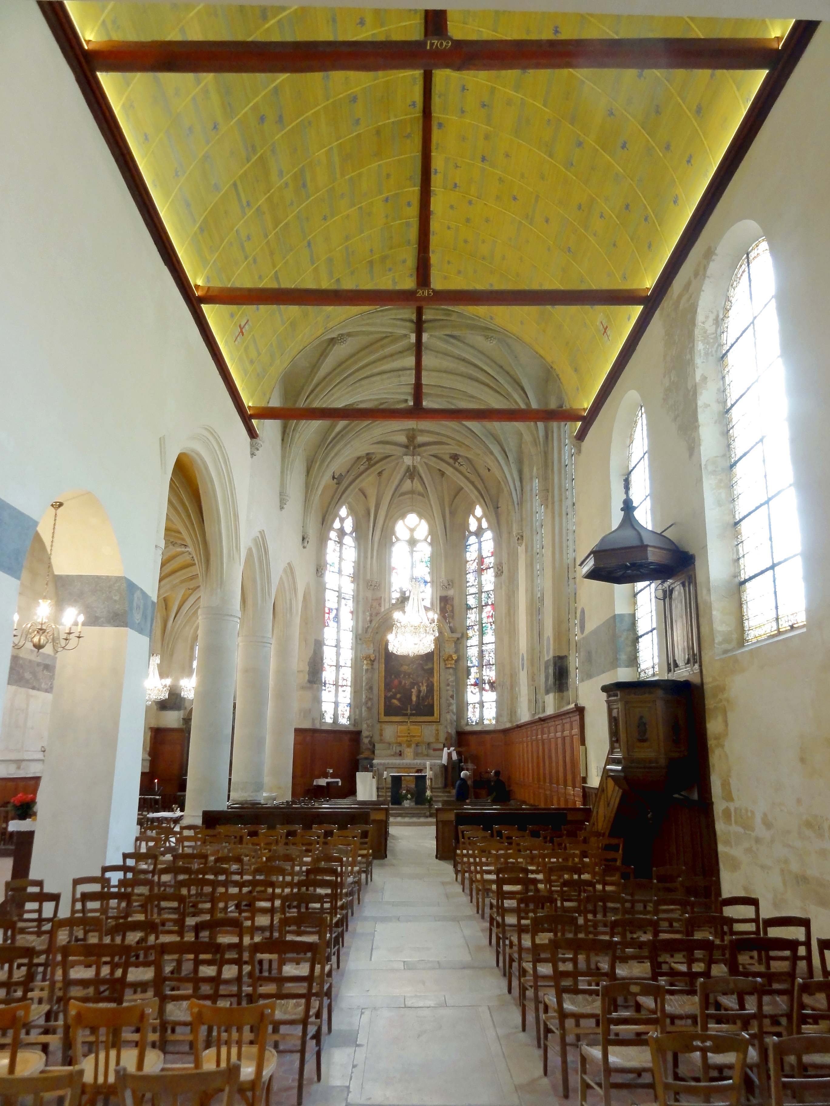 Intérieur de l'église - voir titre.